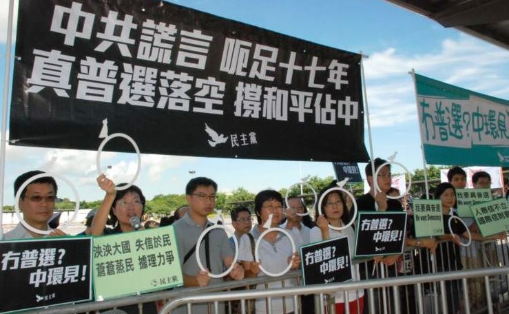 中文（台灣）: 十多名民主黨成員到北京官員政改簡介會場外示威，表示會支持佔領中環